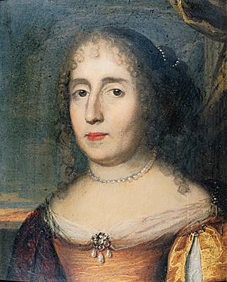 Portrait de Madeleine de Scudéry